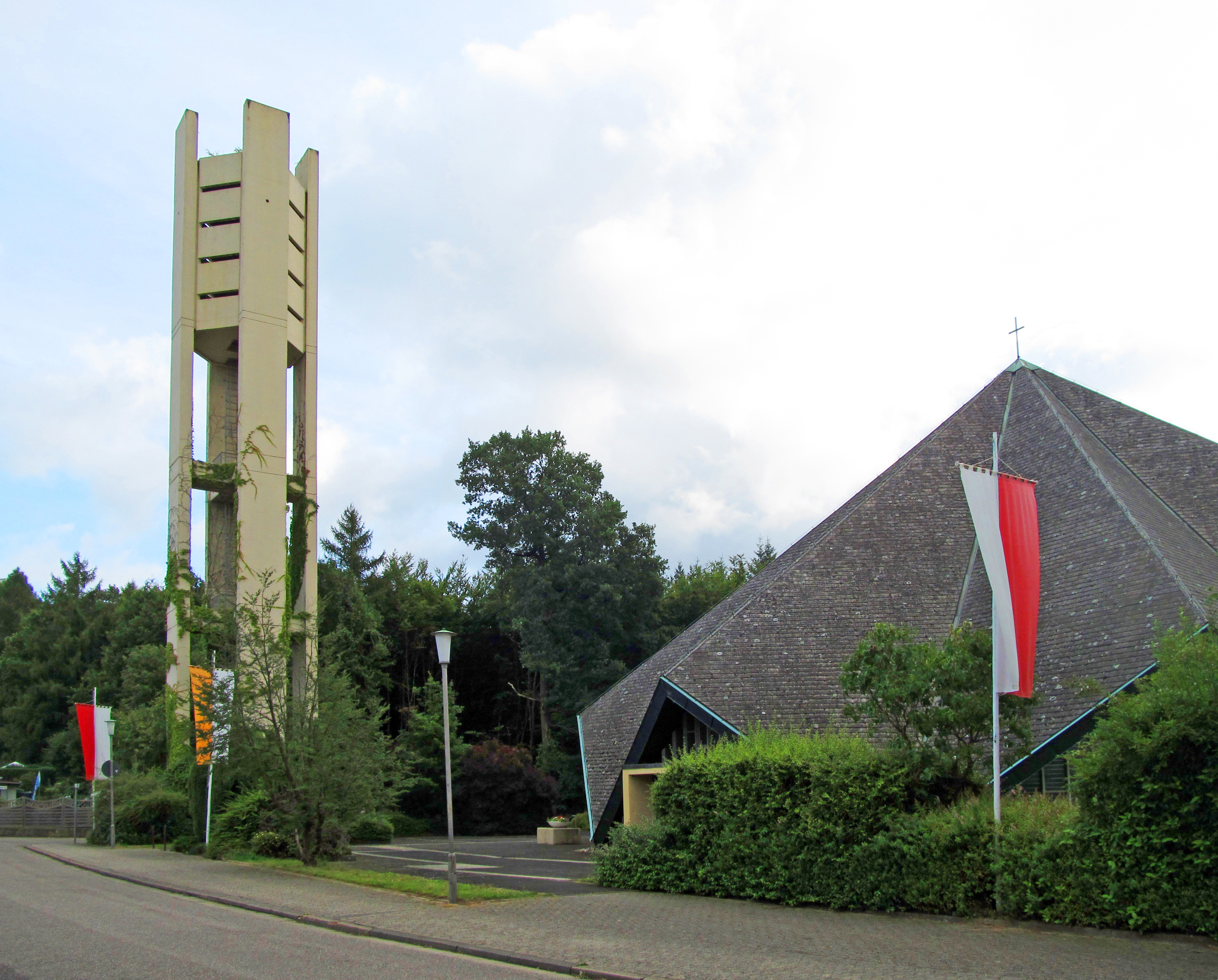 Die katholische Pfarrkirche St. Michael in St. Ingbert, Saarland